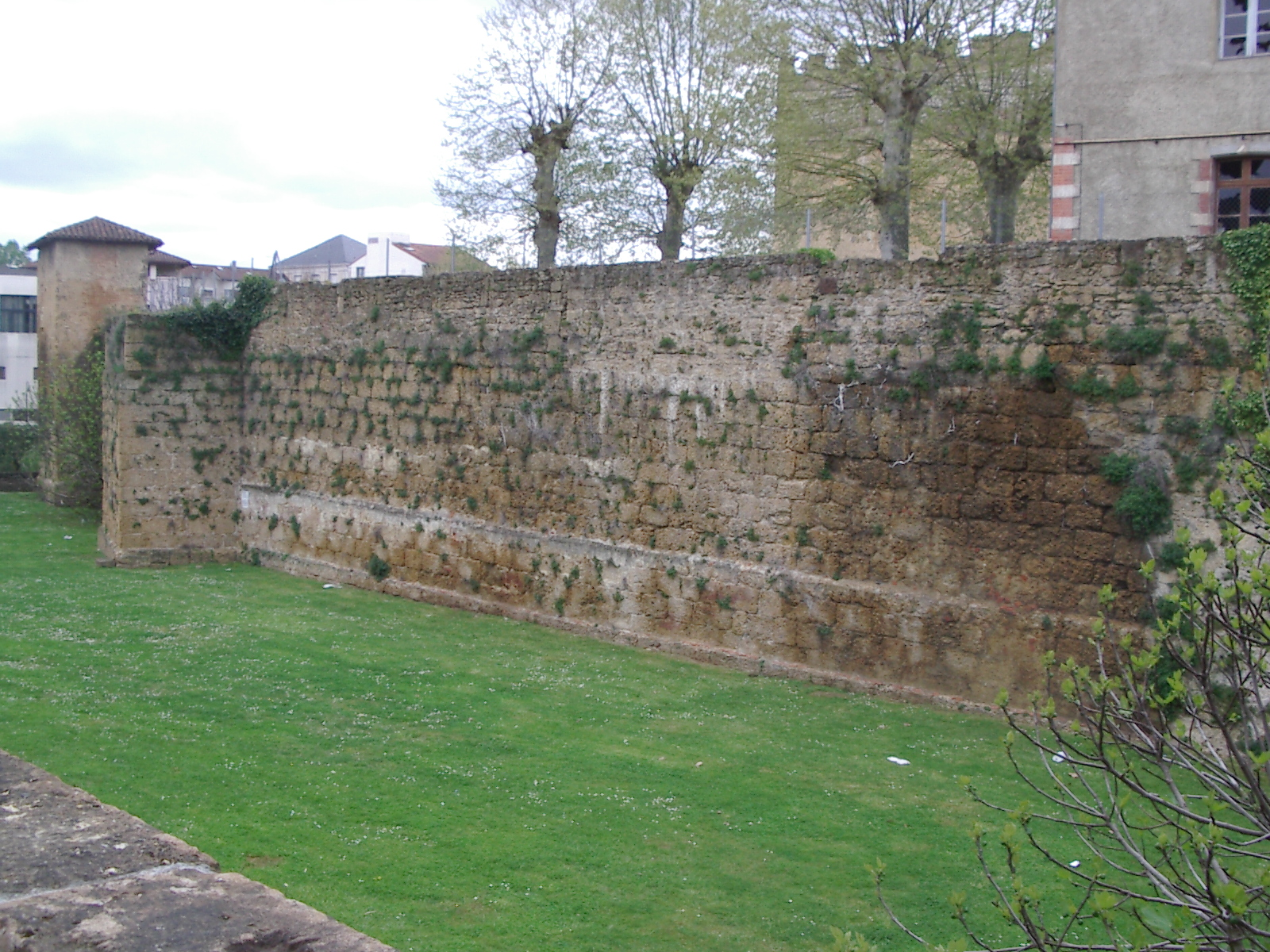 Remparts de Mont-de-Marsan (Inscrit) .